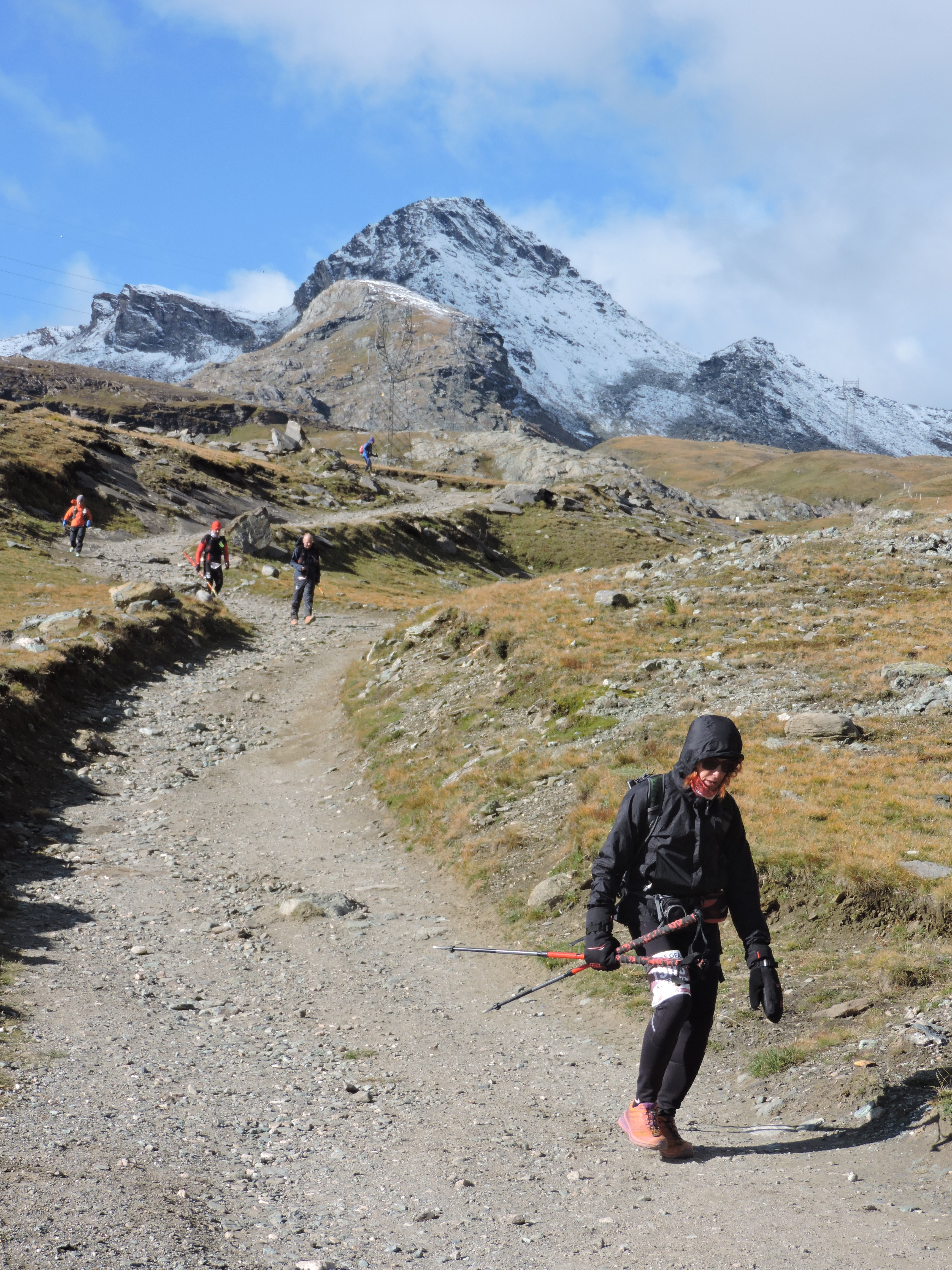 Mont Avic e Mont Emilius (Q47462732) Miserin Tor des Géants 2017